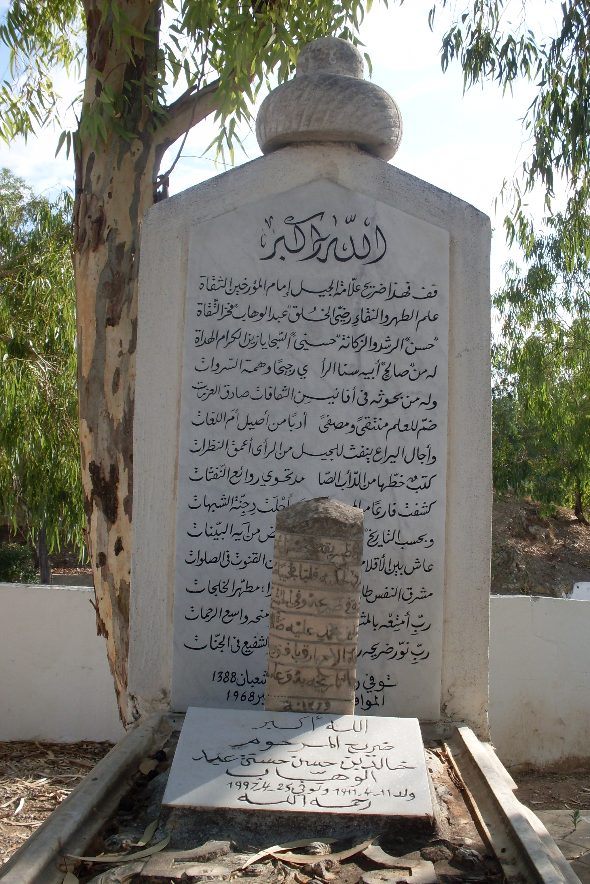 Tombe de Hassan Hosni Abdelwaheb et de son fils au cimetière Djellaz Tunis